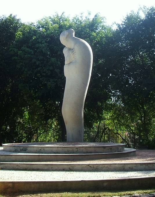 Caetano Fraccaroli (1911-1987) - Mãe, 1964. Obra vencedora de concurso nacional sobre o tema. Pesa 24 toneladas e foi esculpida em um bloco único de mármore. Parque Buenos Aires, bairro de Higienópolis, São Paulo, Brasil.